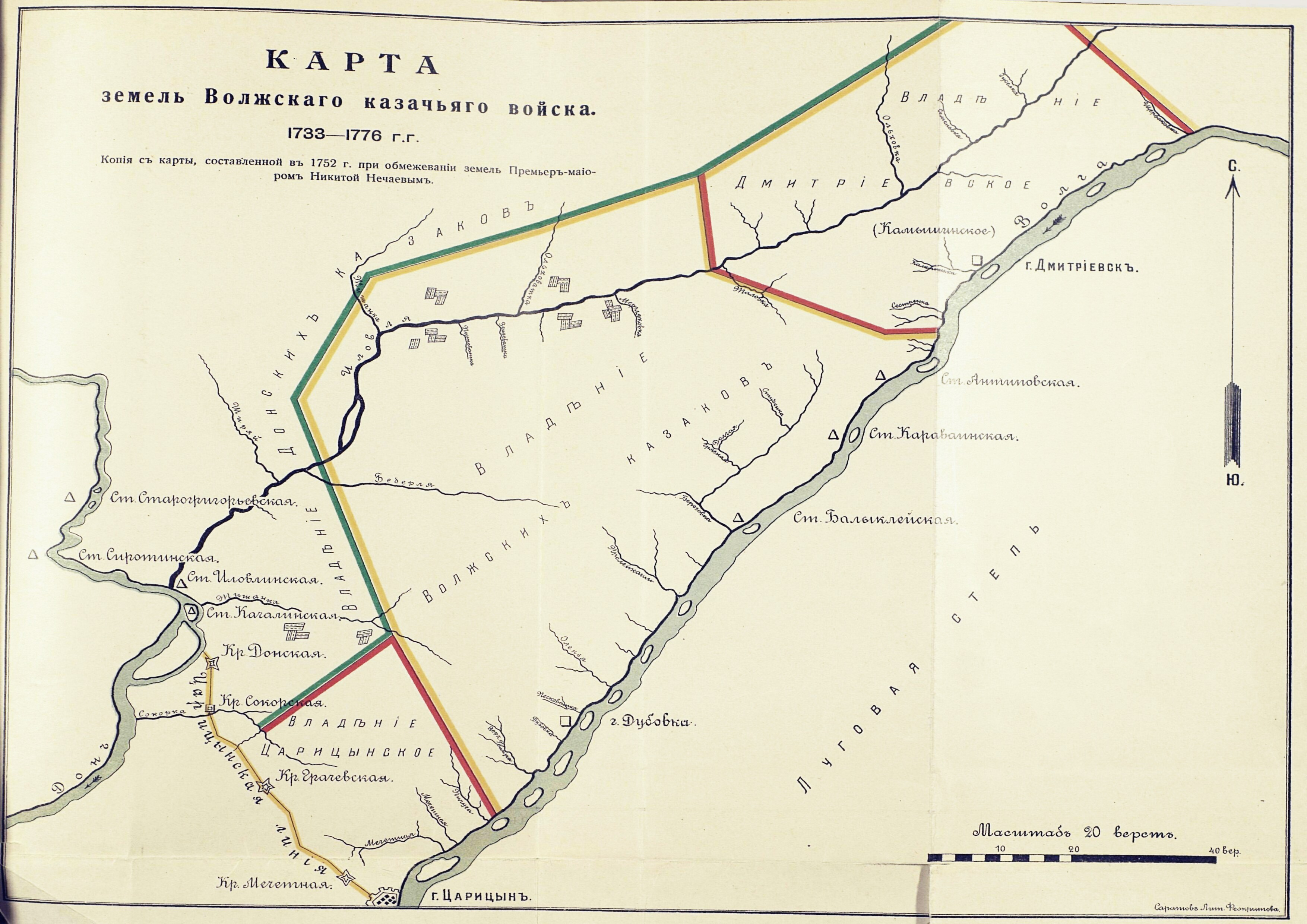 Карта земель Волжского казачьего войска 1733-1778 гг. Копия с карты, составленной при обмежевании земель